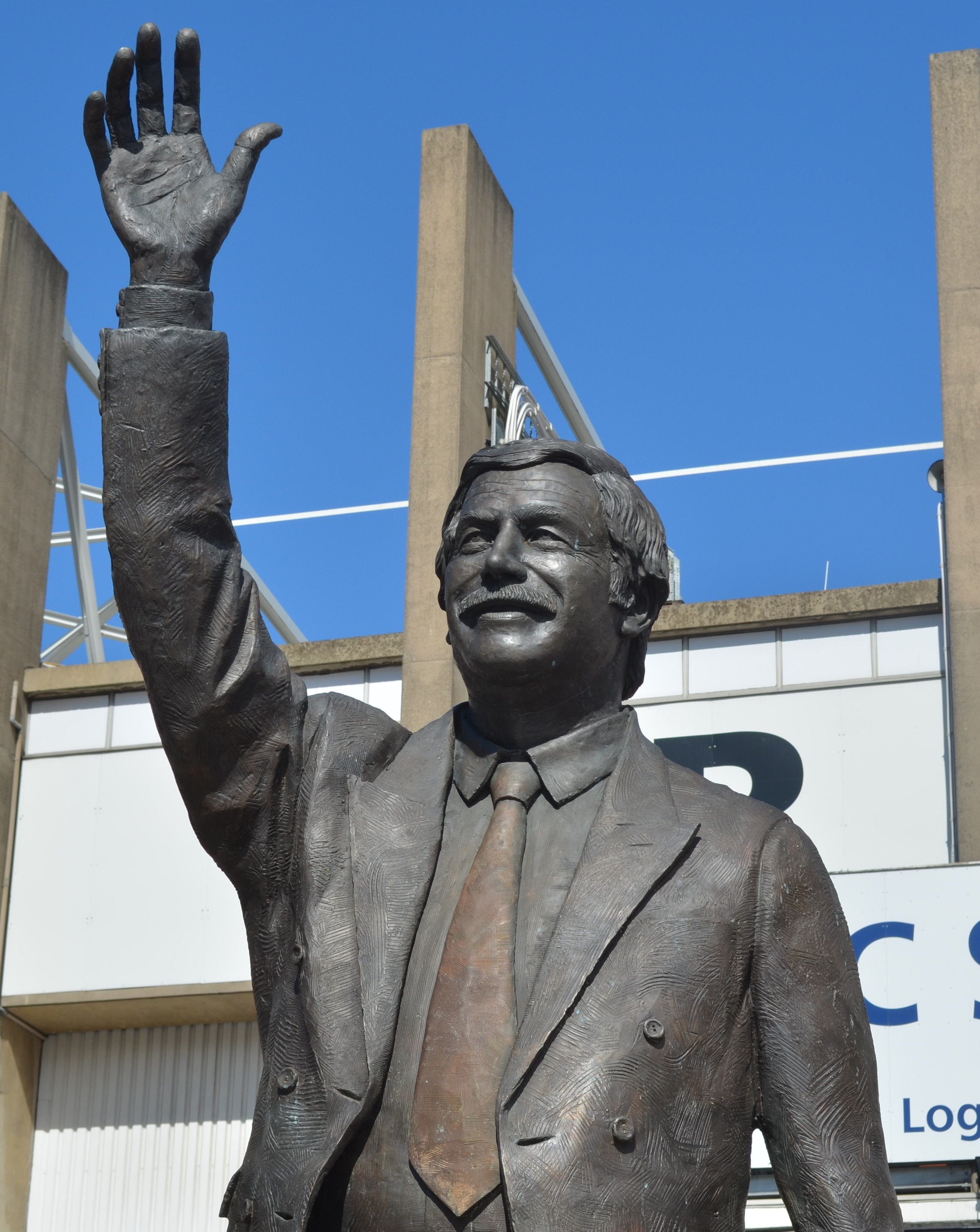 Derek Dooley statue